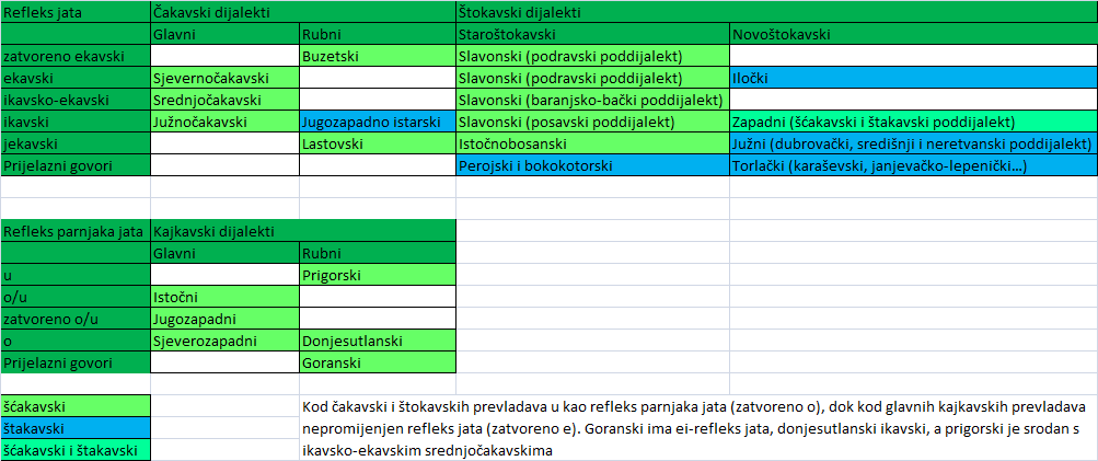 Kategorizacija hrvatskih dijalekata s obzirom na jat, njegovog parnjaka i šća/šta isoglosu, također, u čakavskim dijalektima je prisutnija vokalizacija (gubljenje suglasnika), čakavski i štokavski imaju većinski refleks poluglasa [a], a kajkavski [e]